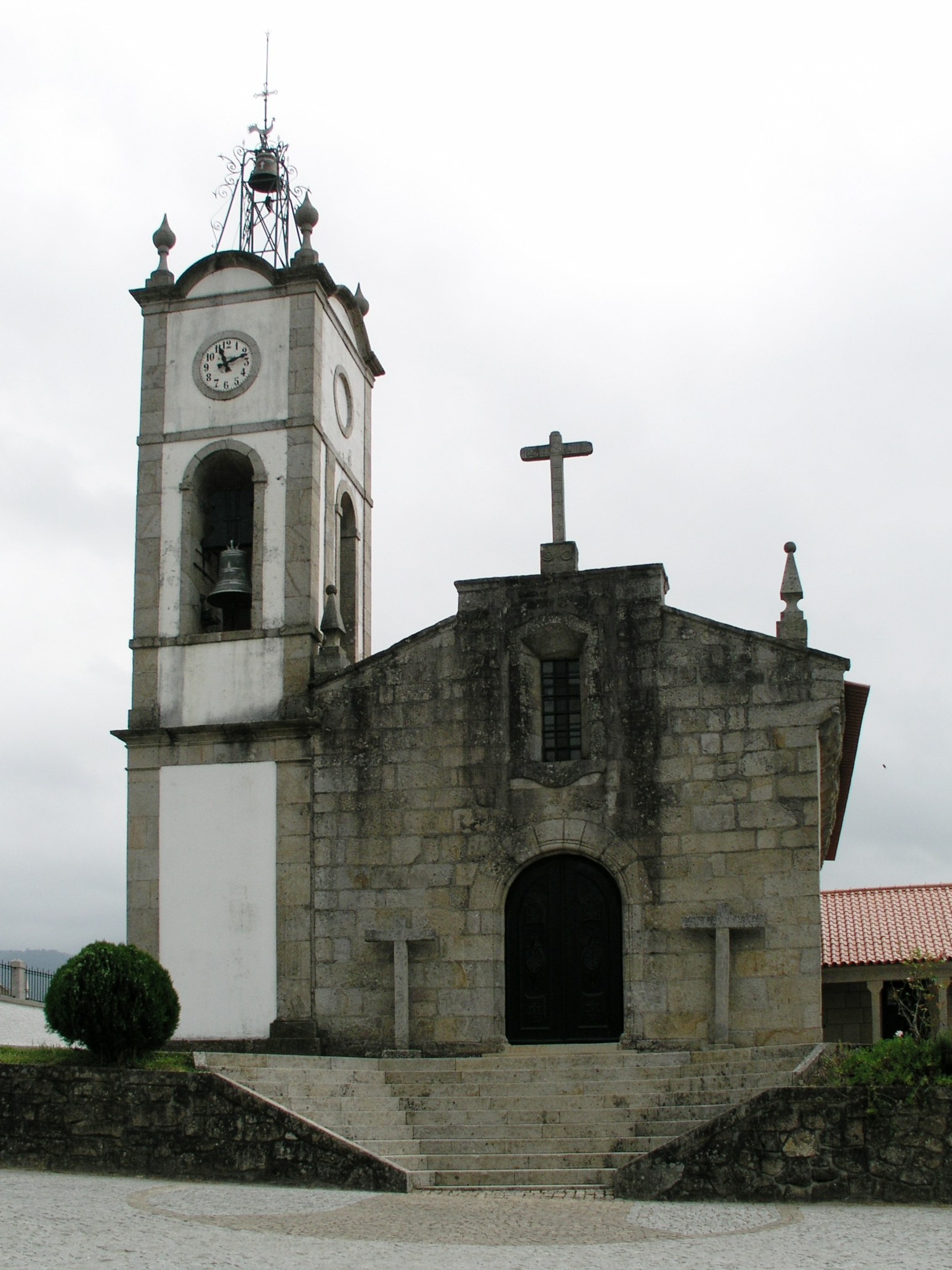 Ponte de Lima, Freguesía Arcozelo, Igreja paroquial. Portugal